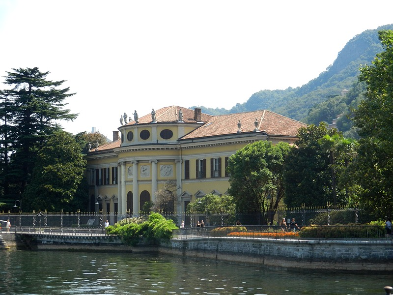 Como - Villa Saporiti - La Rotonda (facciata posteriore)